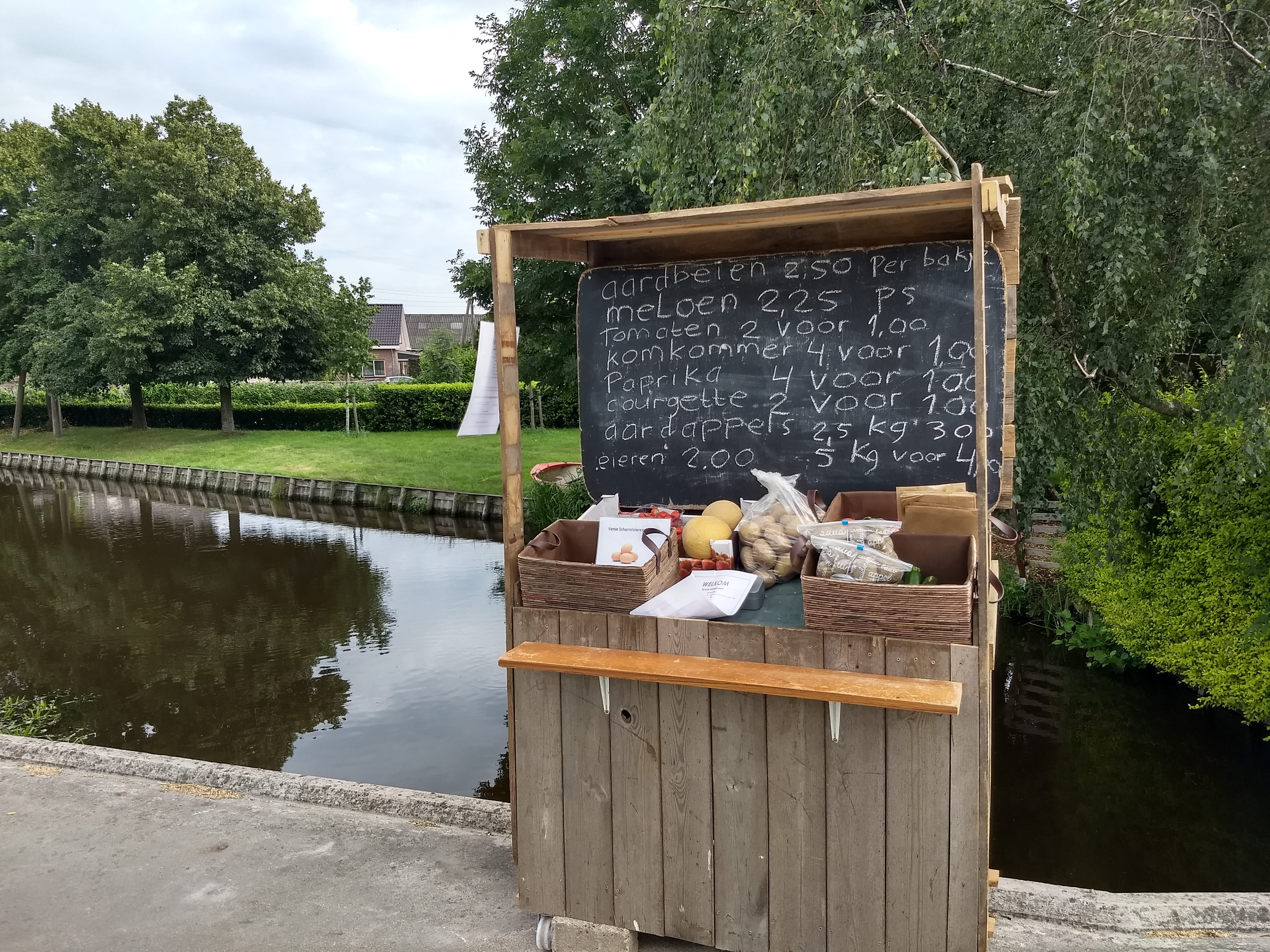 Een boer verkoopt zijn waren langs de weg (Oud Bodegraven)